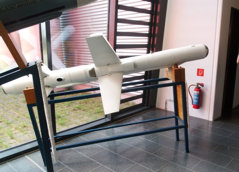 Luftzielflugkörper Sea Sparrow